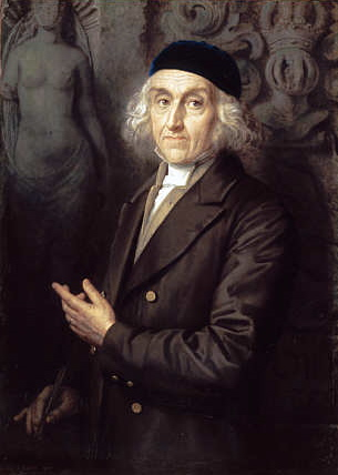 Charles de Graimberg (1774-1864)